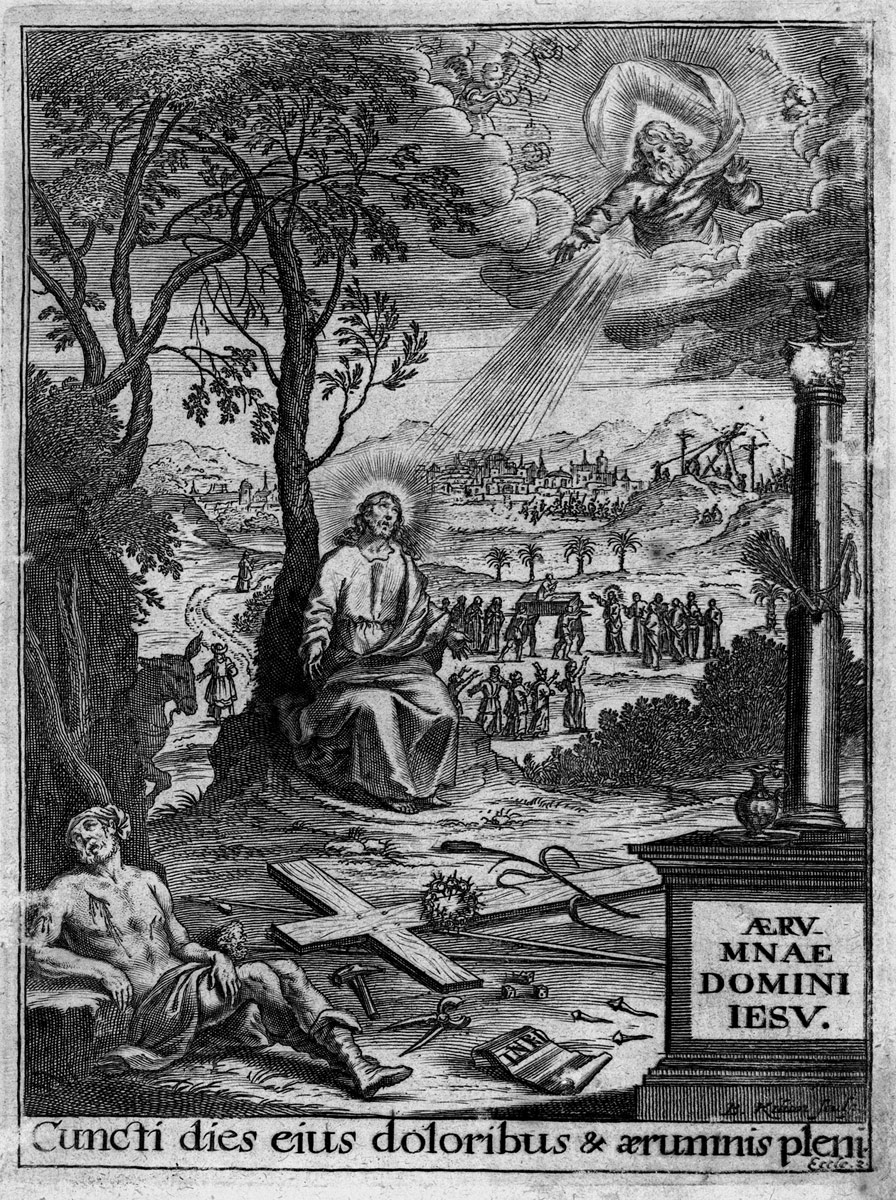 Copperplate by B. Kilian, from: Thomé de Jesus: Aerumnae Jesu, Das ist: Betrangnussen Unsers Erlösers Christi deß Herrn, Welche Er von seiner Empfängnus an, biß in seinen Todt erlidten, München, Johann Wagner und Johann Hermann von Geldern, 1678.